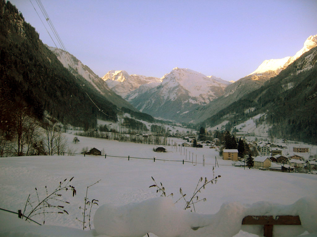 Diesbach (Kanton Glarus) im Winter